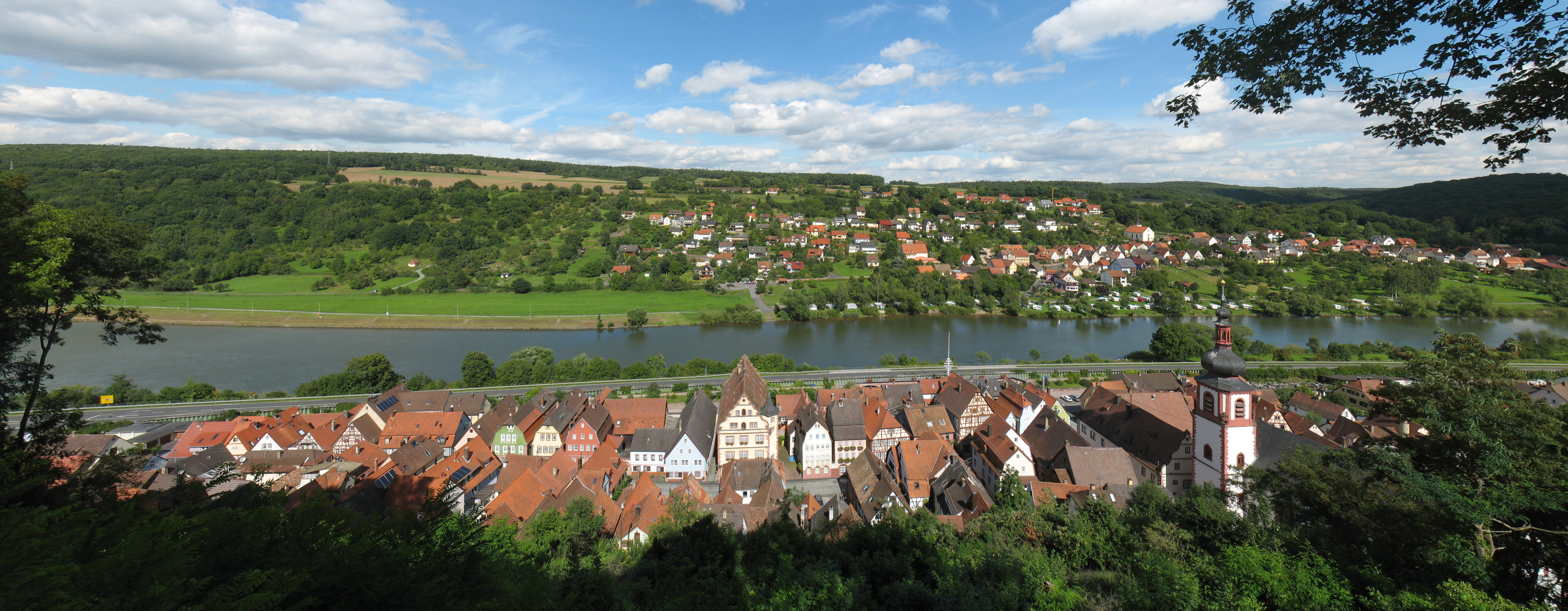 Panoramabild von Rothenfels, Main und Zimmern, gesehen von der Burgterasse. Rectilineare Projektion.